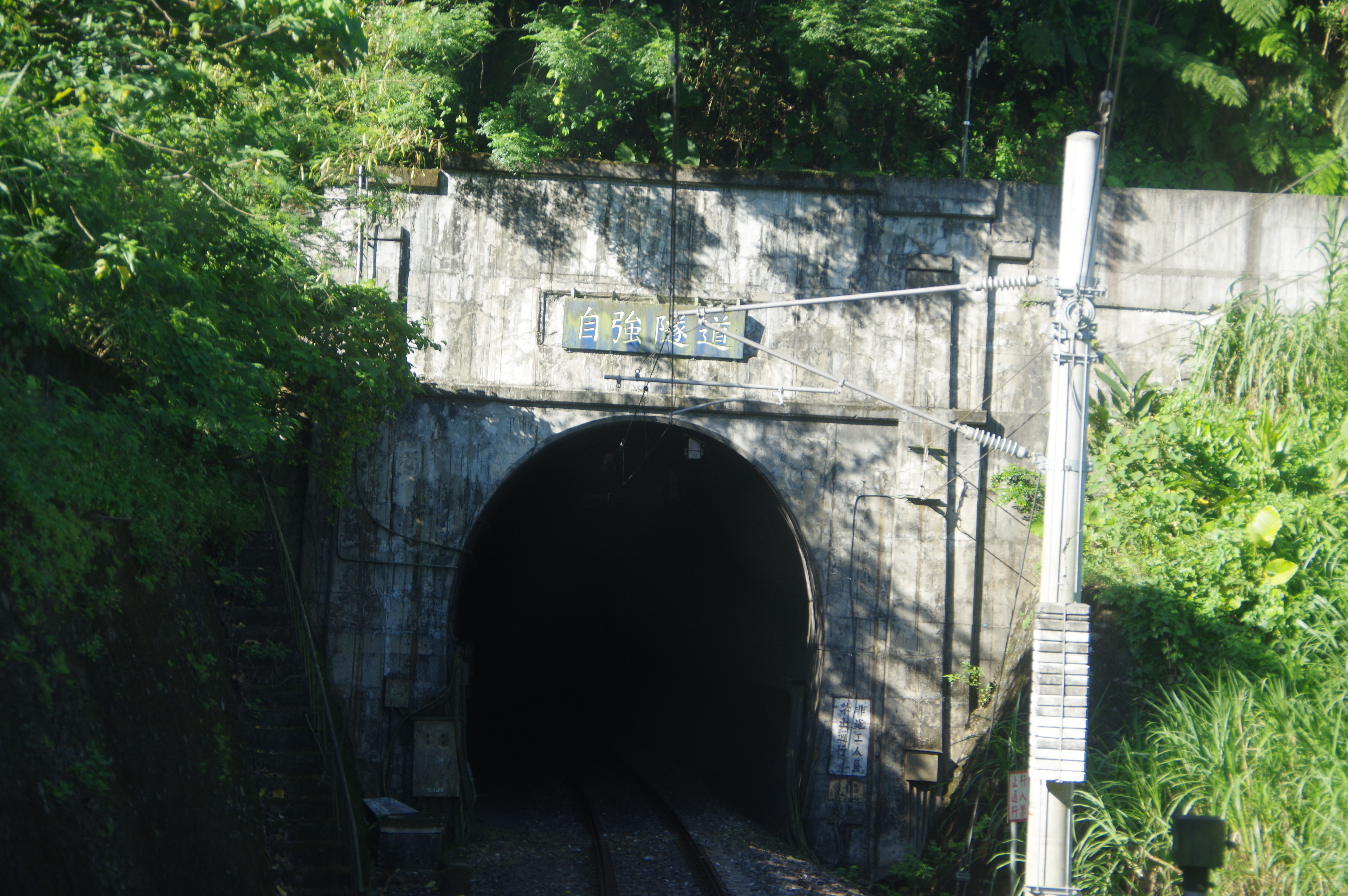 臺灣鐵路管理局第一代自強隧道北口